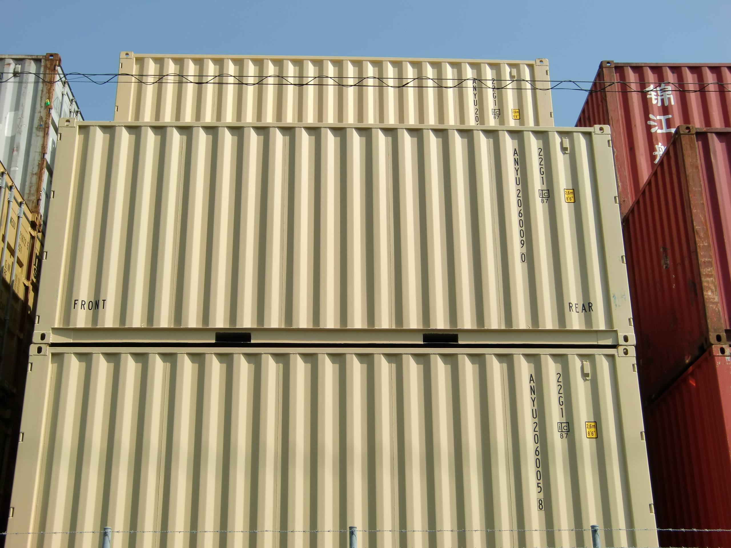 関連資料画像。 大阪府／大阪南港北埠頭。